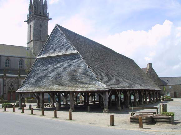 Halles de Plouescat ; Symbole de la fonction économique de la ville construite au début du XVIe siècle.